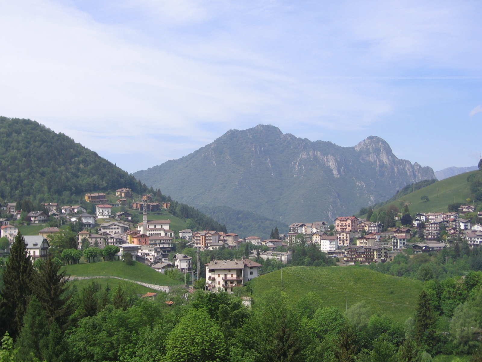 Oltre il Colle, Bergamo, Italia